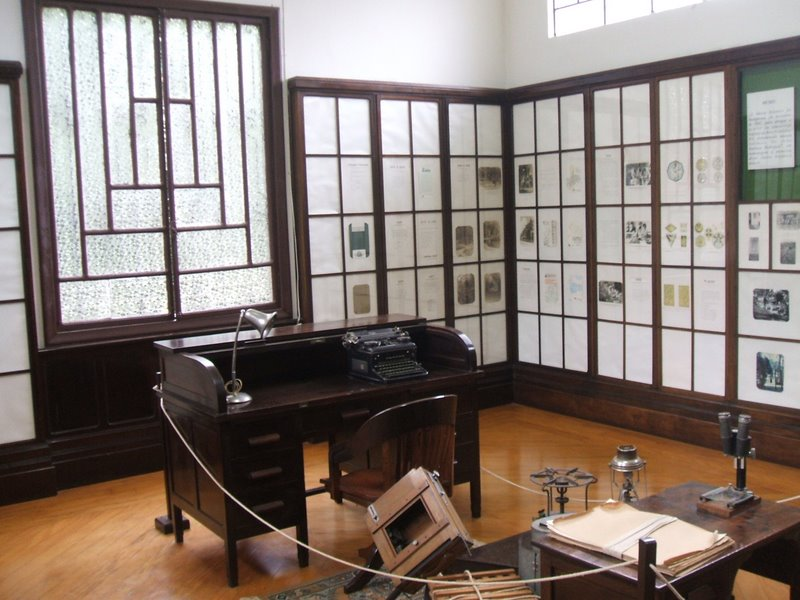 Museu Botânico Dr. João Barbosa Rodrigues, interior do prédio. Jardim Botânico, São Paulo, Brasil.